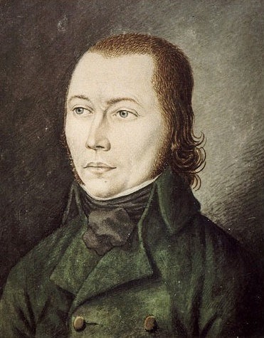 Der Räuber Johannes Bückler-Schinderhannes (+ 1803), gemalt von Karl Matthias Ernst (1758-1830)